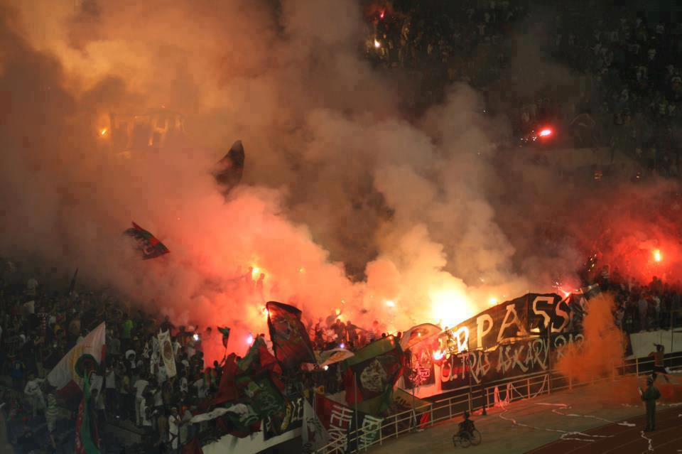 craquage des supporters far